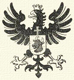 Blason de la famille hongroise alsólindvai Bánffy (Bánffy de Alsólindva)